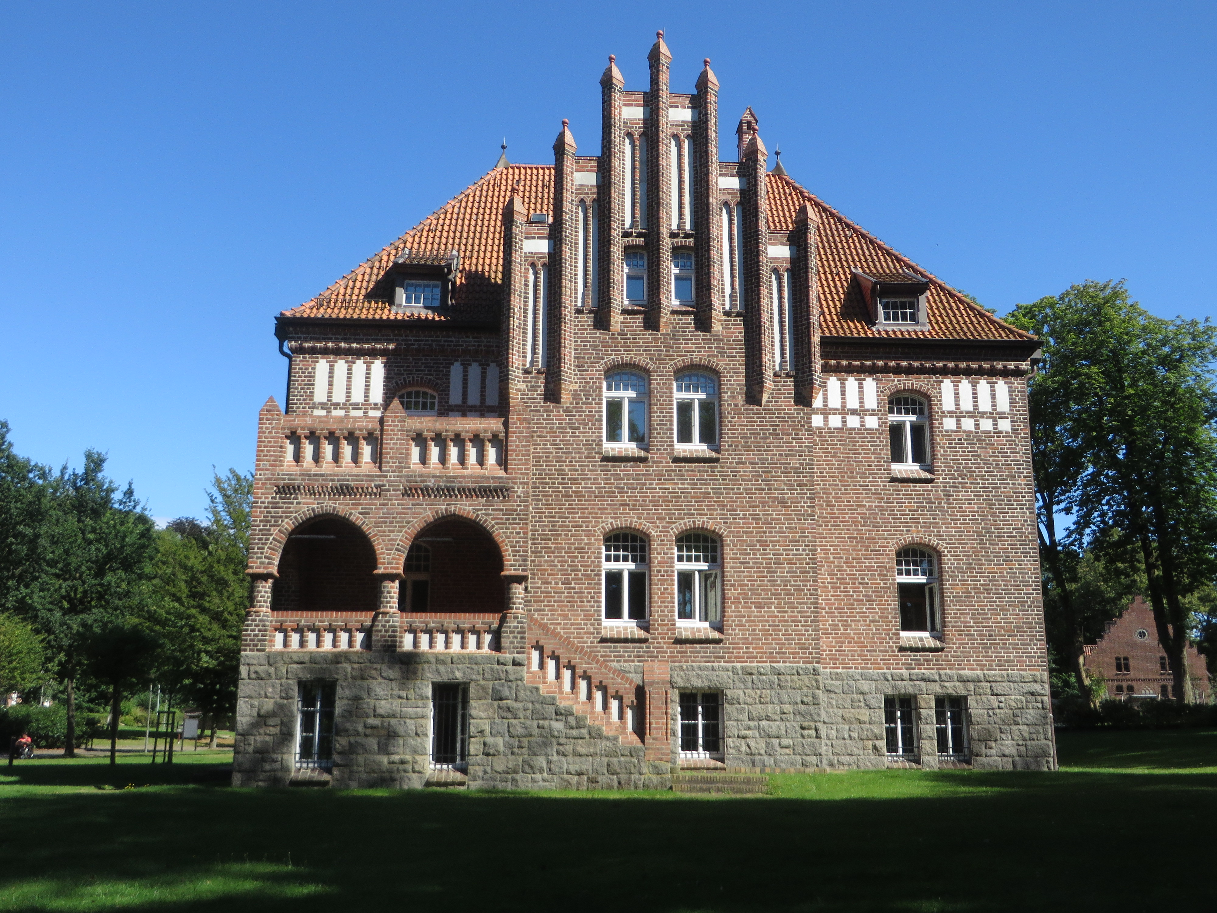 Kommandeursvilla (Flensburg-Mürwik 16 August 2016), Bild 07